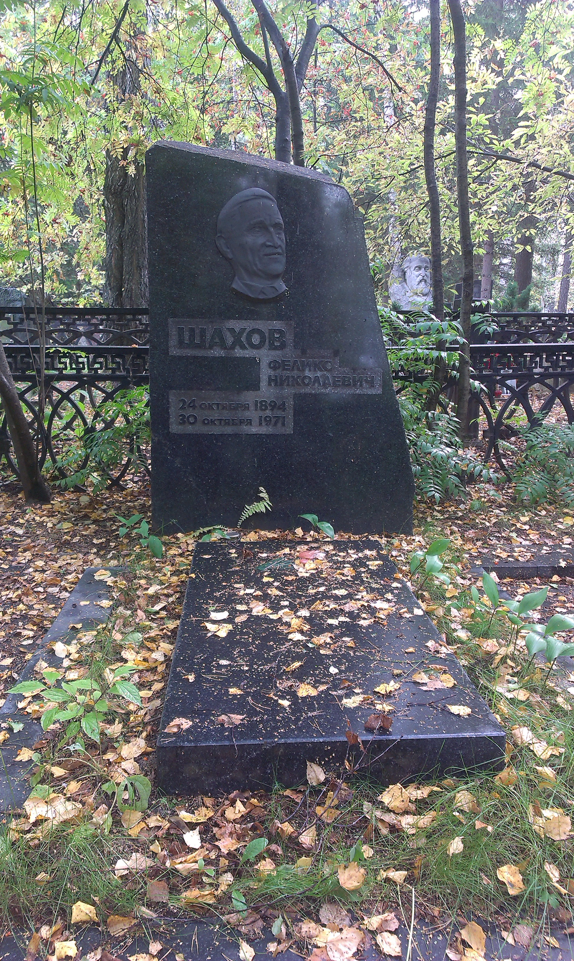 Южное (Чербузинское) кладбище